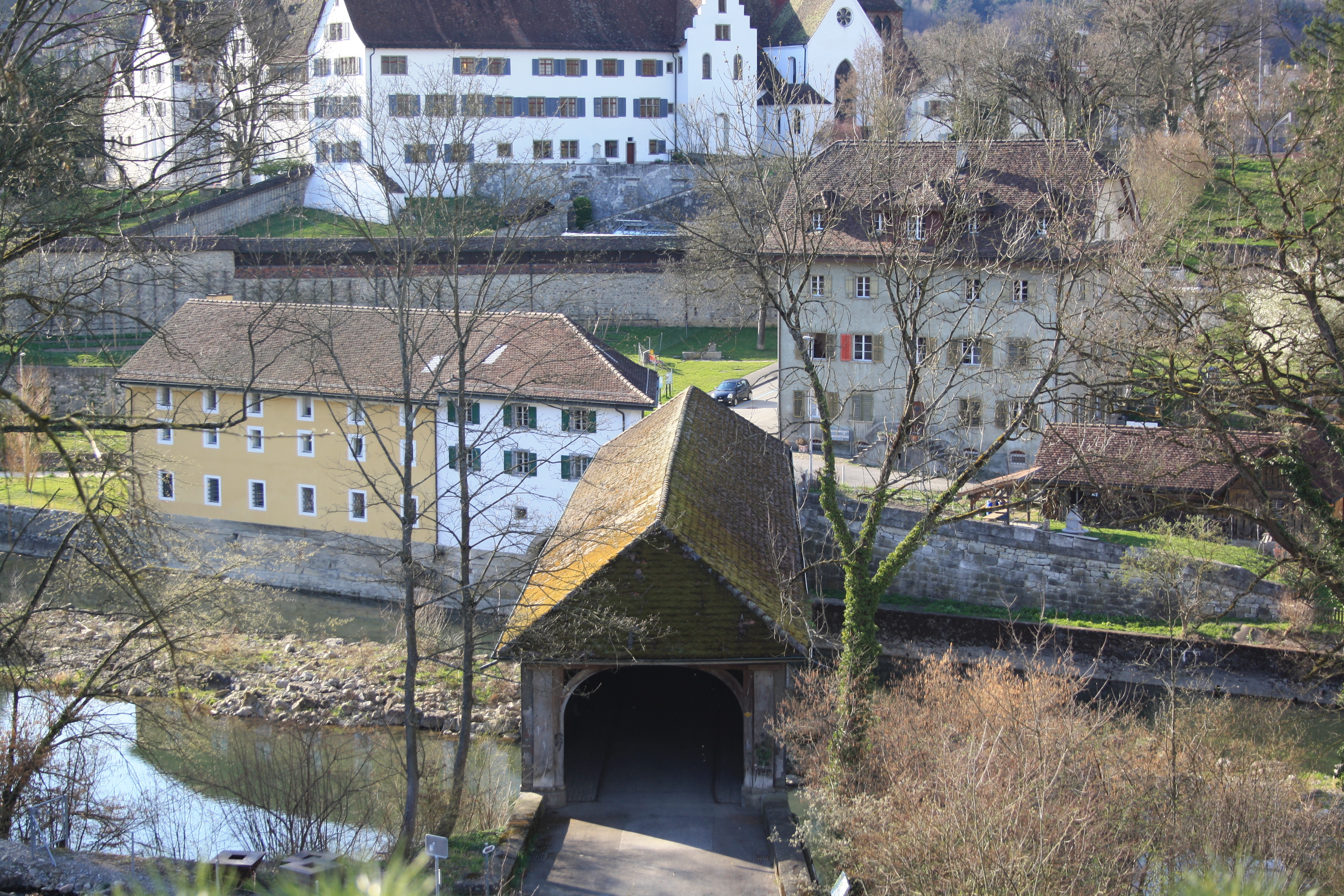 Holzbrücke Wettingen-Neuenhof